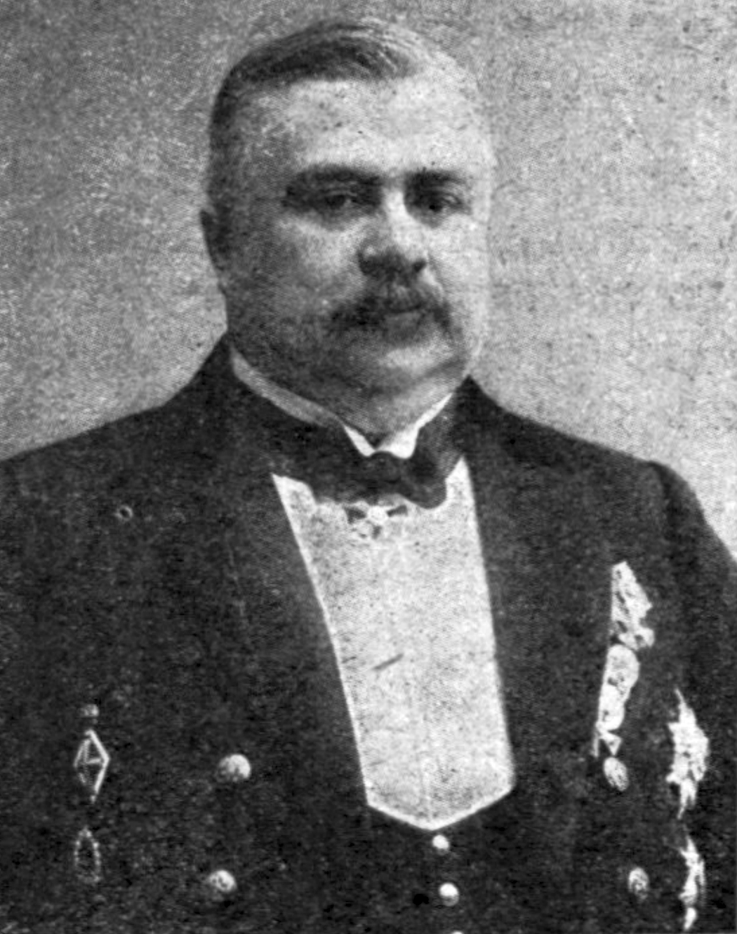 Филиппов, Владимир Гаврилович